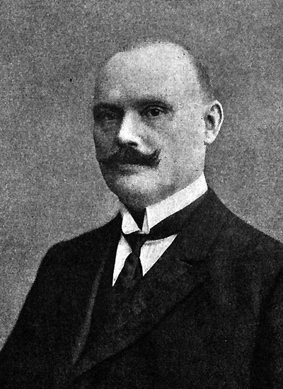 Oscar Lomberg